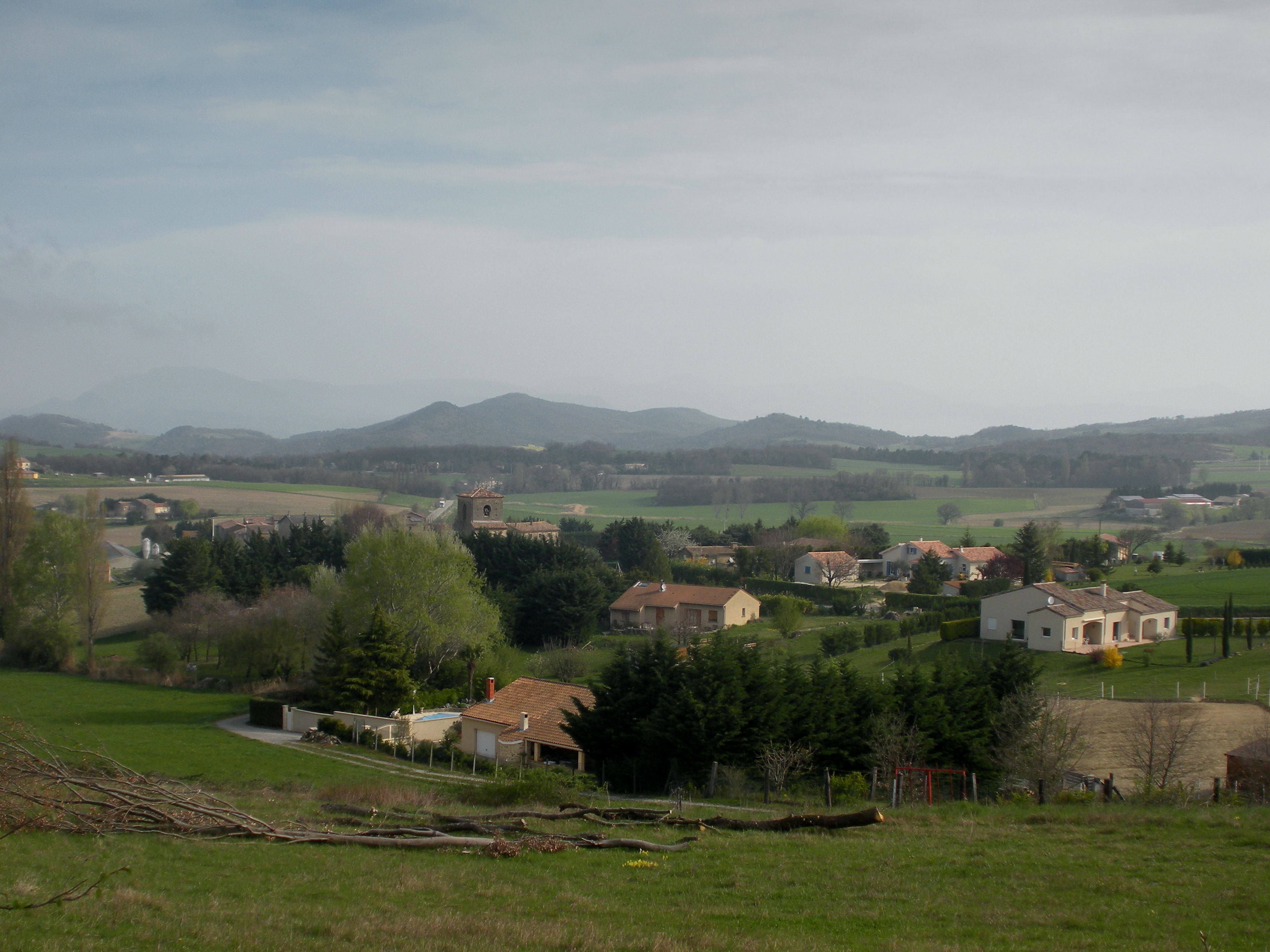 les Lombards